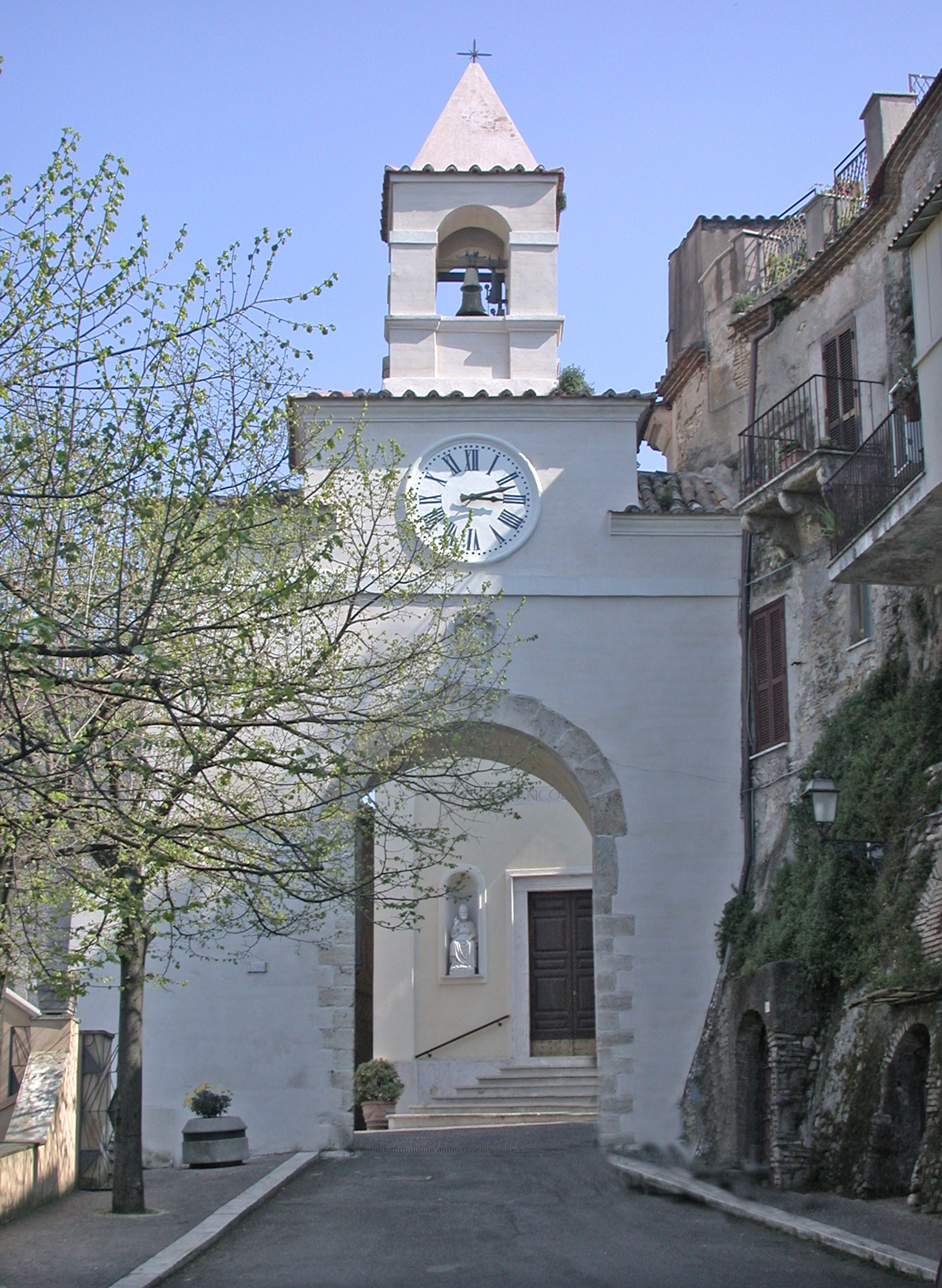 Italia, Lazio, provincia di Roma, Montelibretti, arco di ingresso al borgo medioevale con facciata della chiesa di San Nicola di Bari